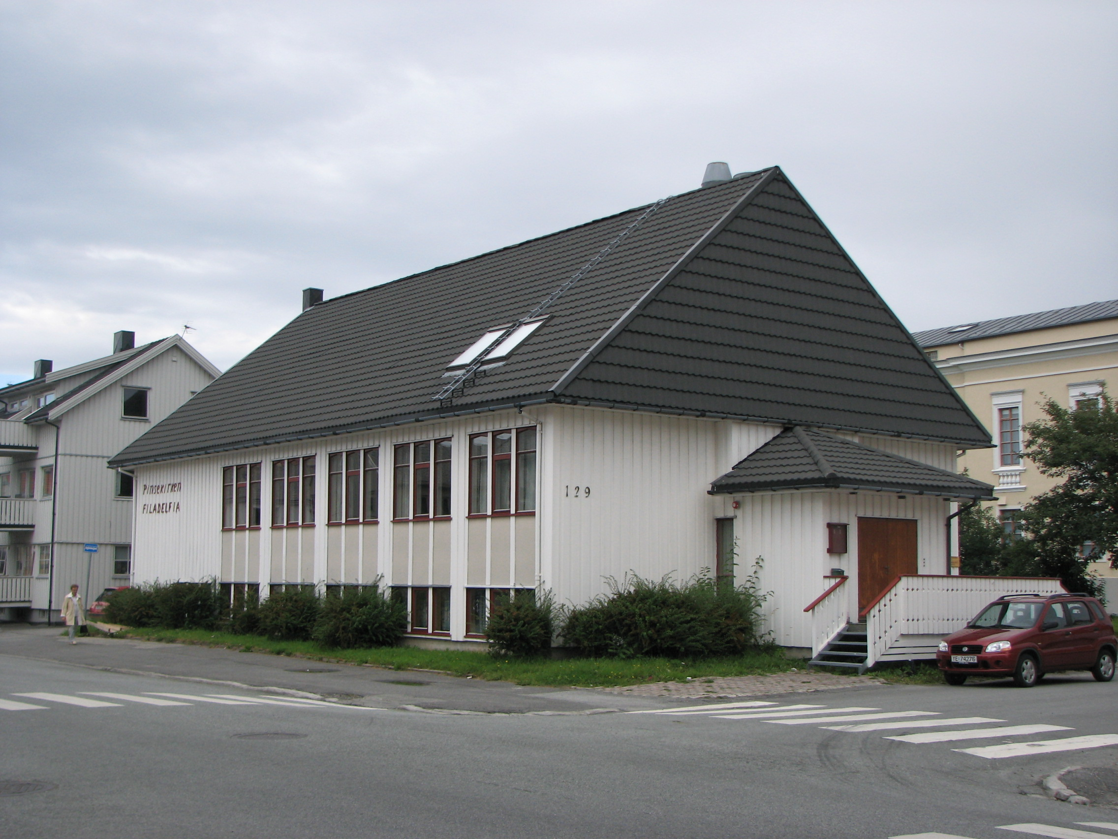 Pinsekirken Filadelfia i Bodø